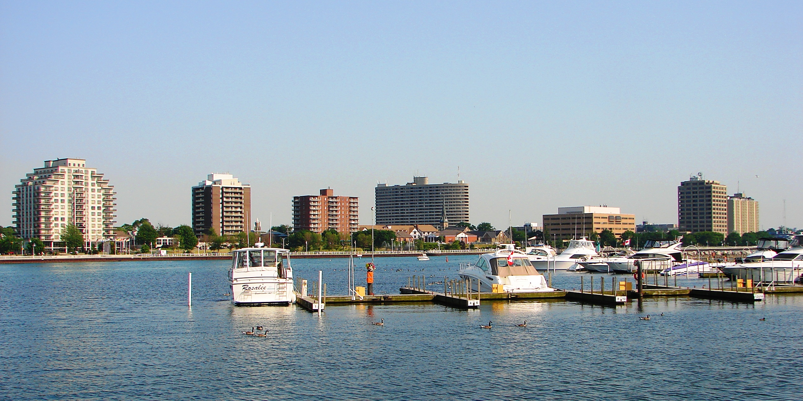 Sarnia, Ontario, Canada